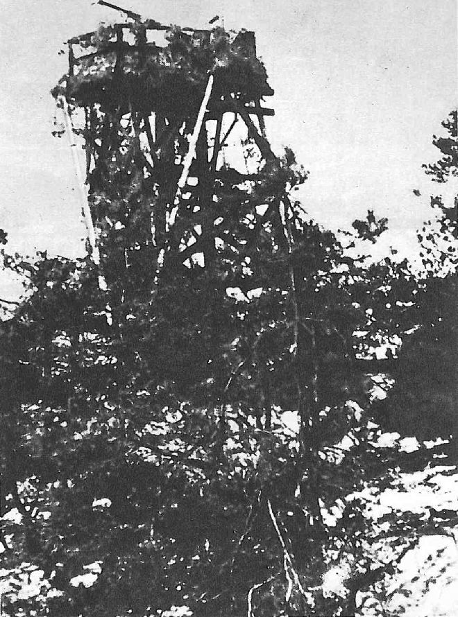 Zamaskowana wieża kierowania ogniem 31. Baterii im. Heliodora Laskowskiego na Helu.